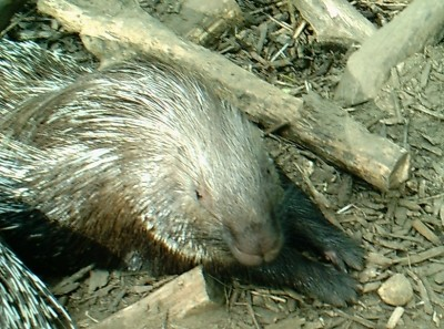 Südafrikanisches Stachelschwein (Hystrix africaeaustralis)